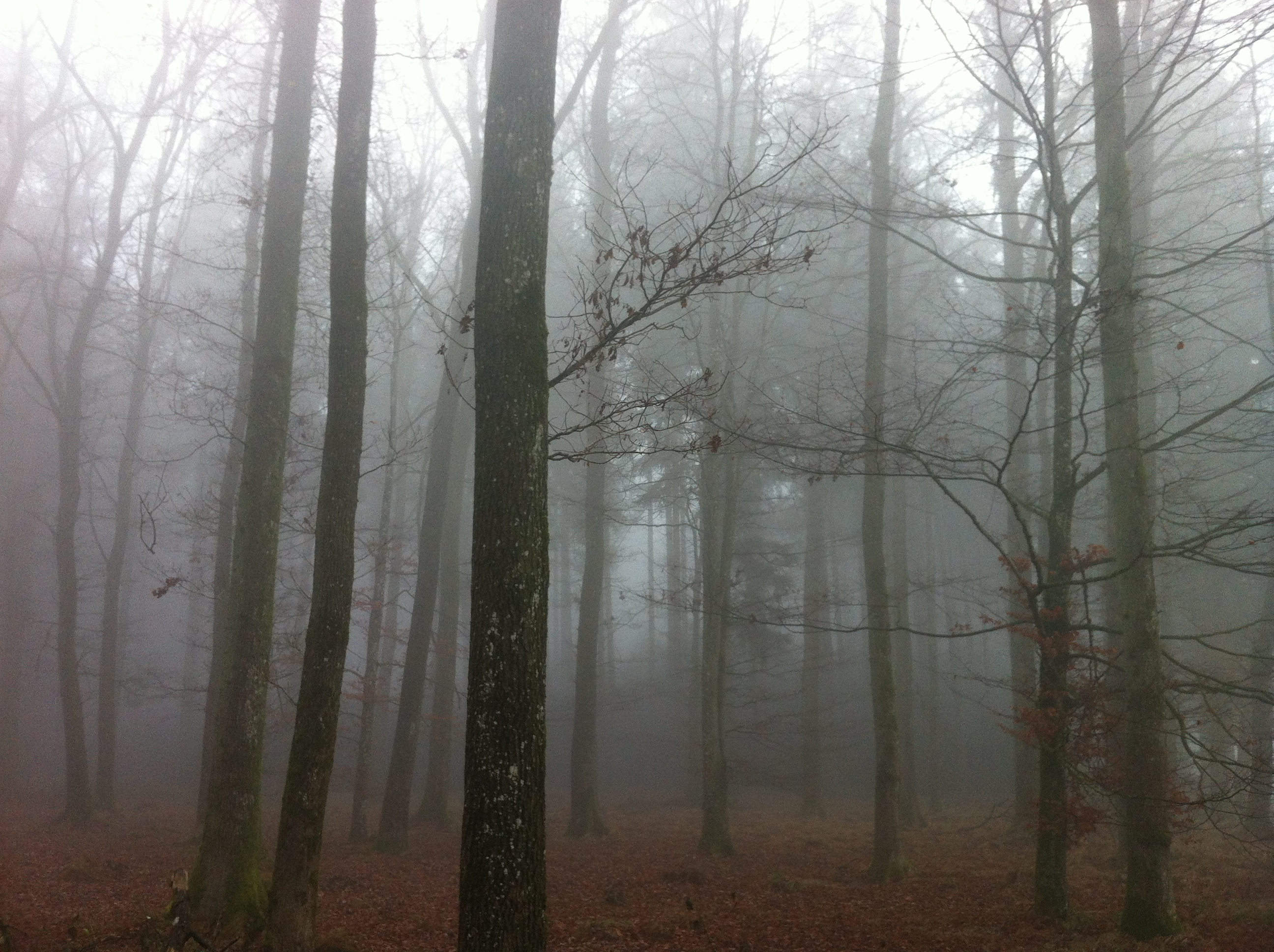 Deutschland (D) - Baden-Württemberg (BW) - Landkreis Sigmaringen (SIG) - Pfullendorf: Herbst im Weithart